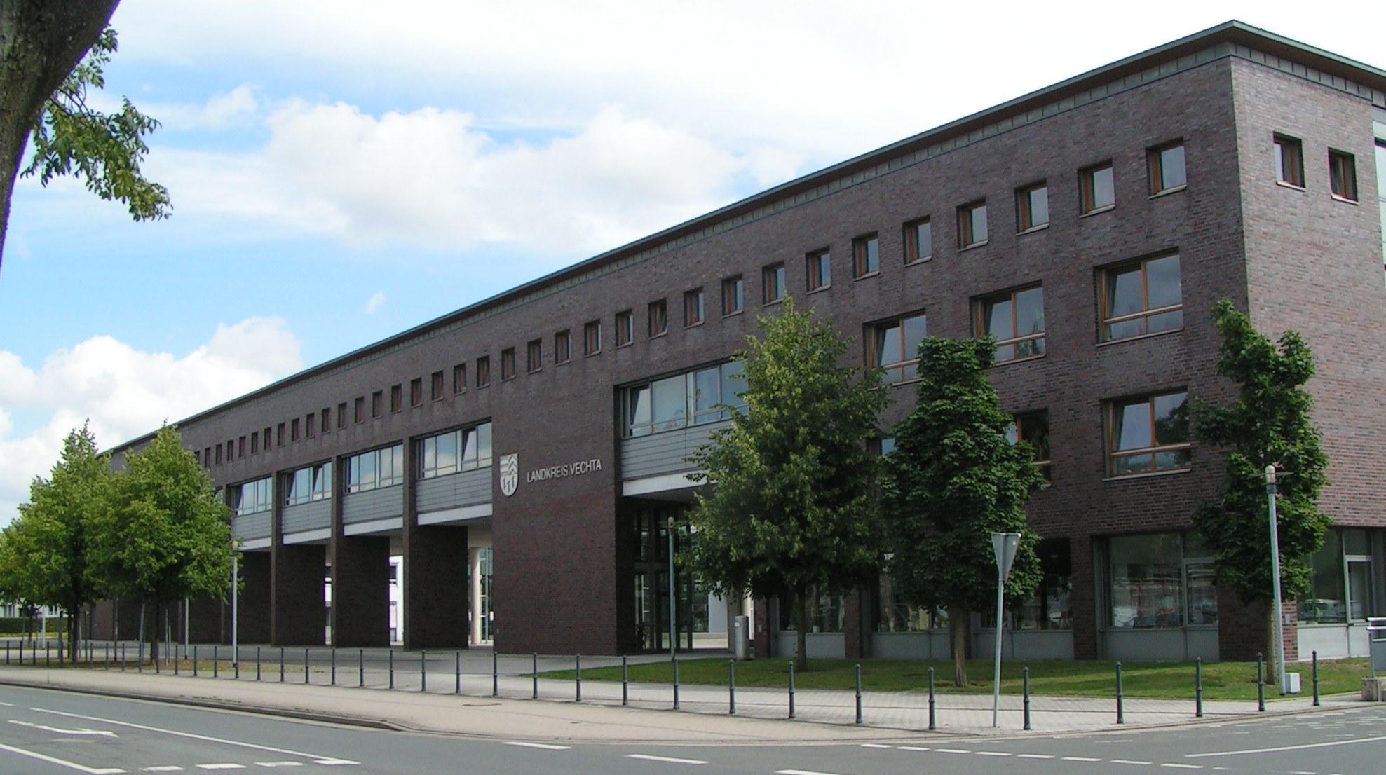 Neues Kreishaus in Vechta (Sitz des Landkreises Vechta)